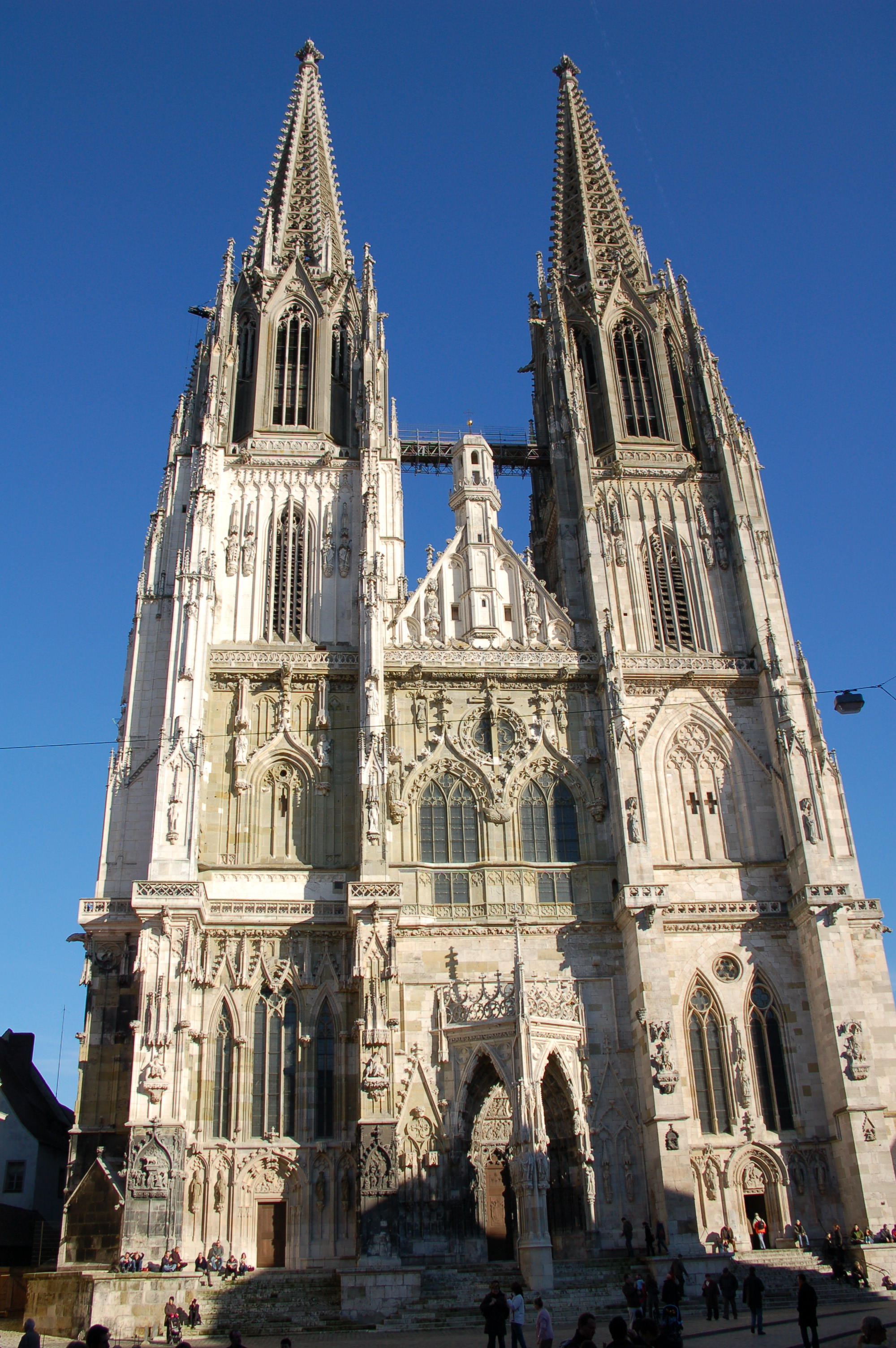 West front of St. Peter in Regensburg